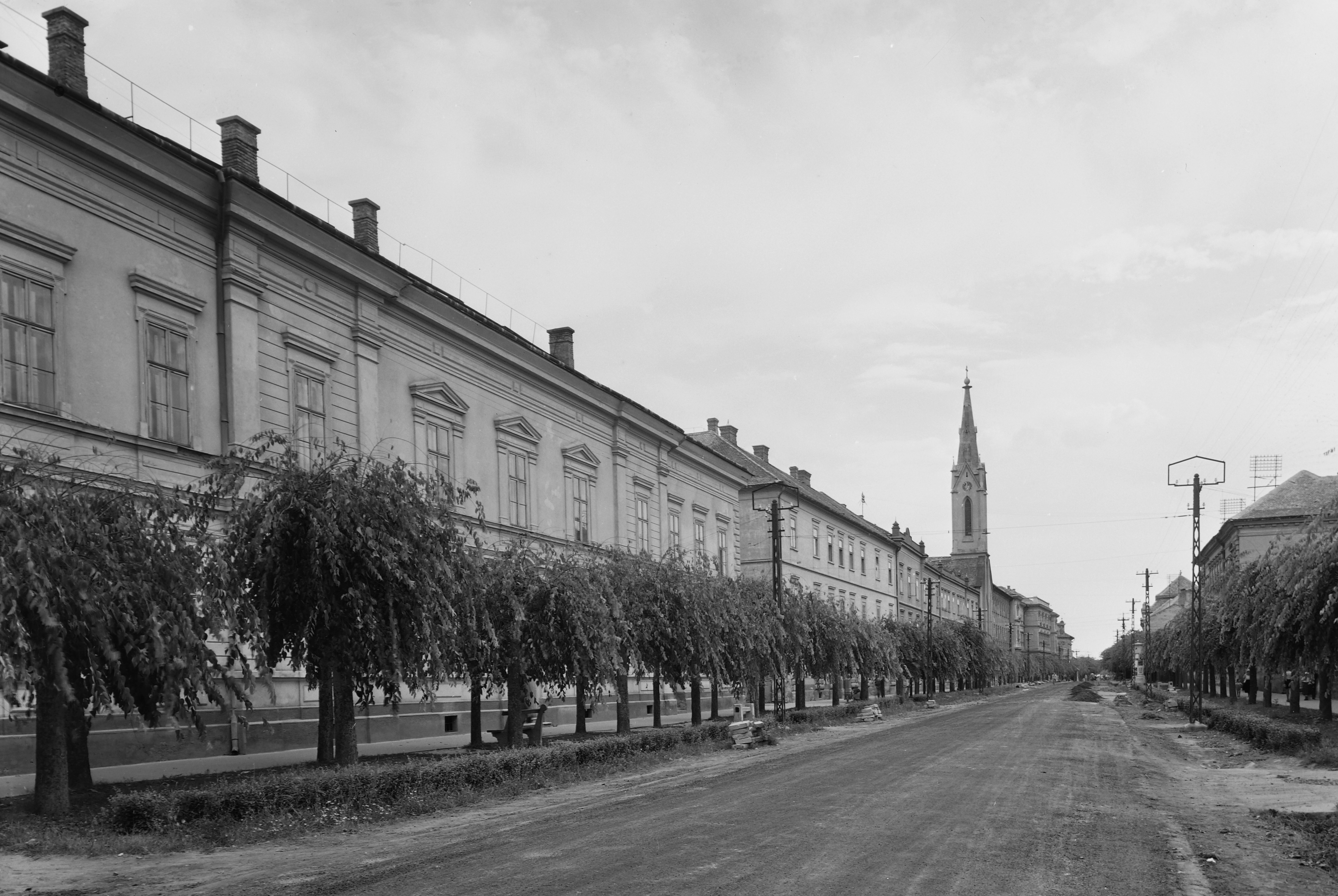 Szent István király út, távolabb a Szent István király templom. Location: Hungary, Kalocsa Title: Szent István király út, távolabb a Szent István király templom.